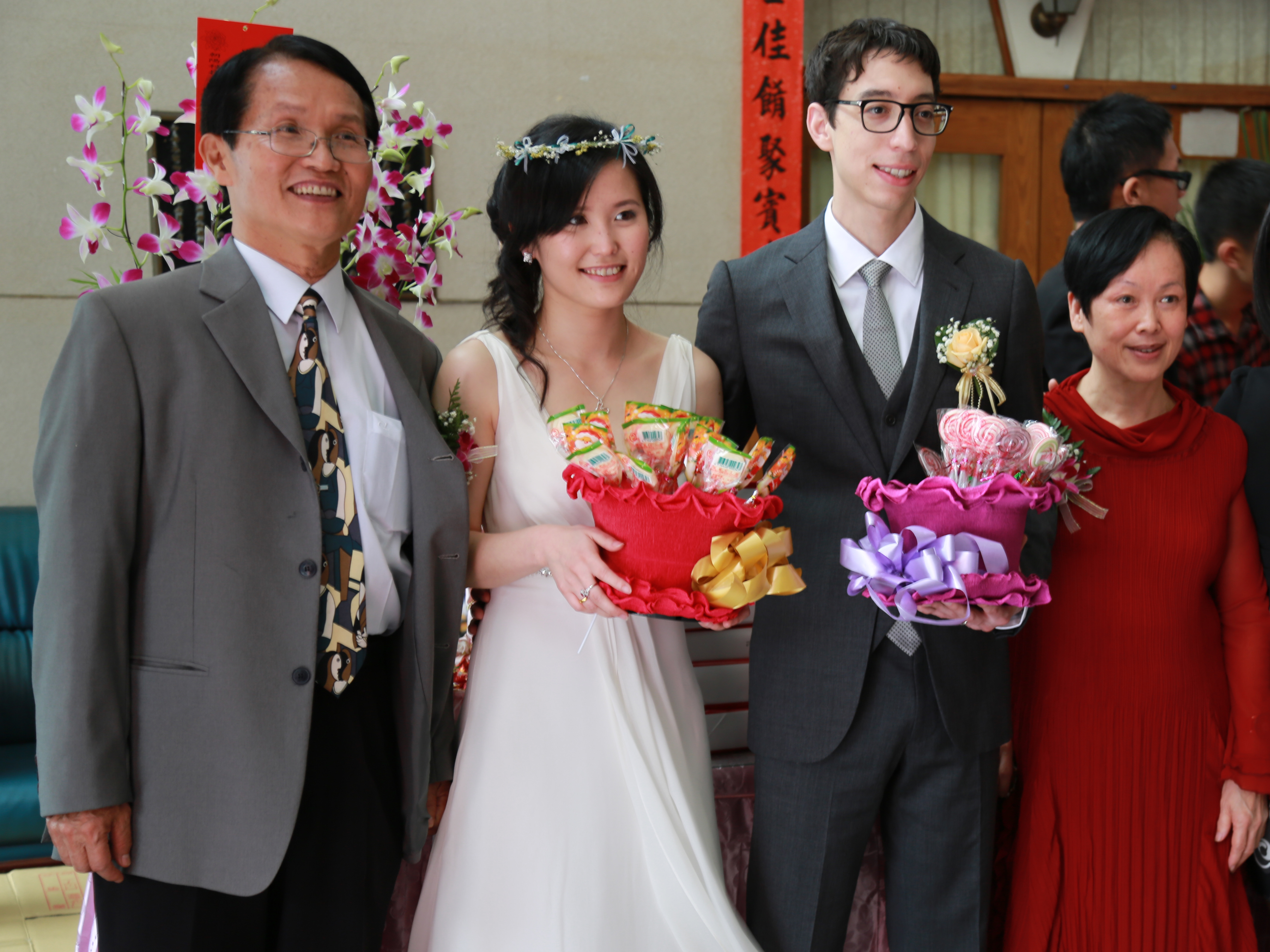 中文（台灣）: 臺灣作家江凌青結婚合影。